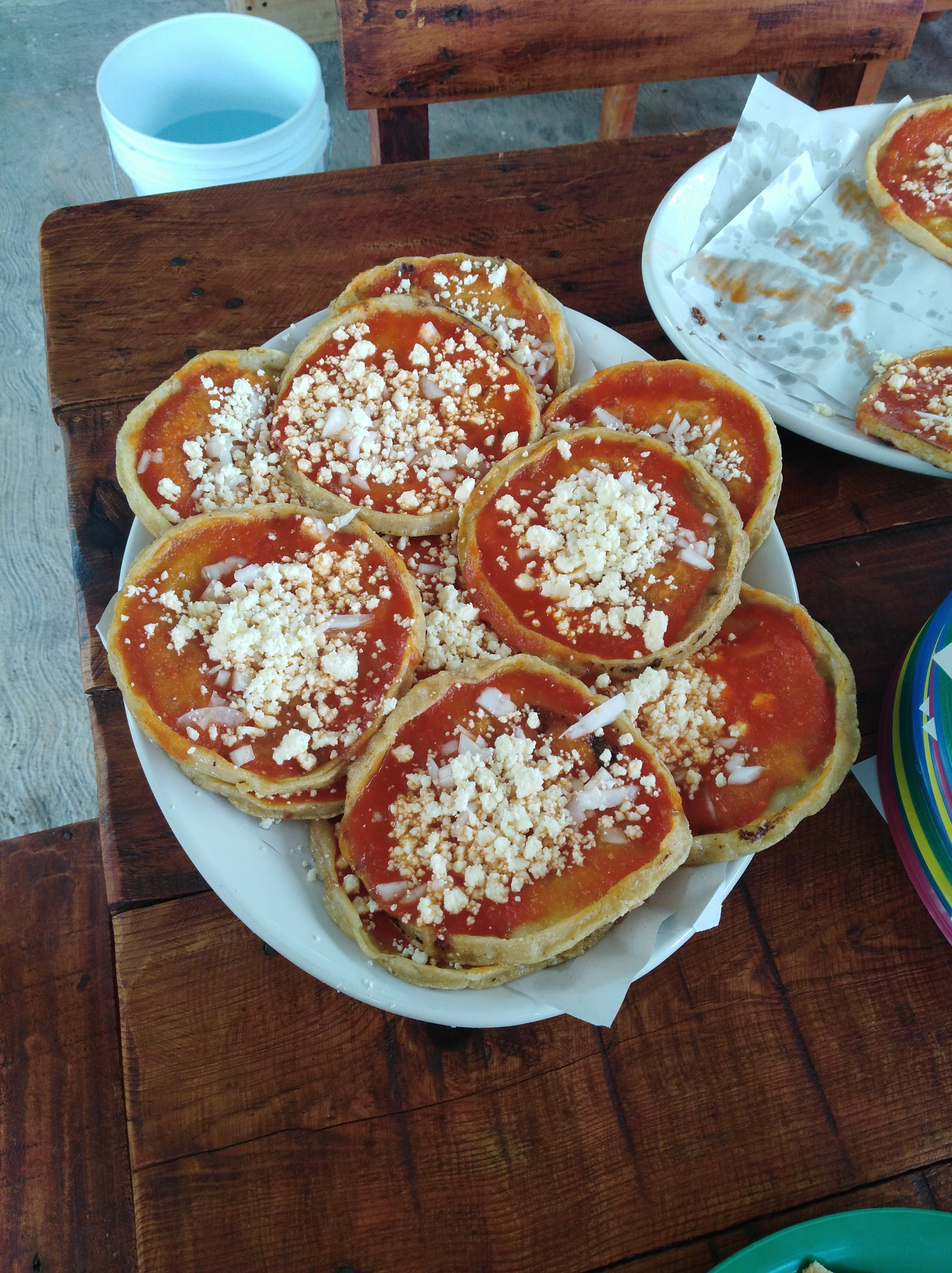 Orden de Picadas